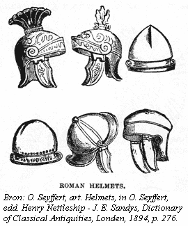 Bronvermelding: zie afbeelding.